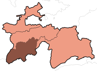 Viloyati Khatlon